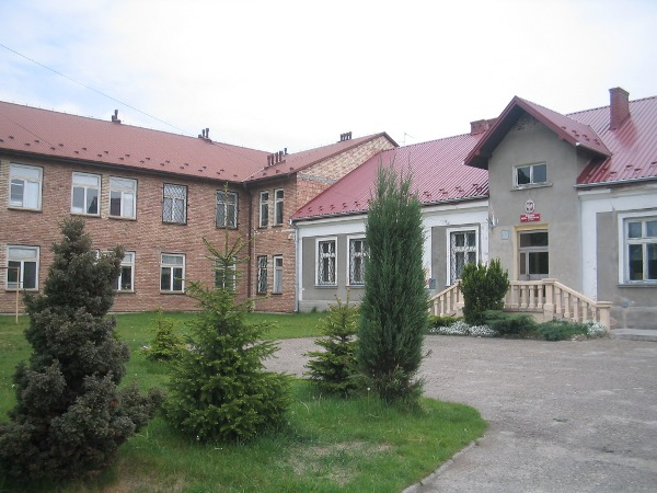 Budynek Publicznej Szkoły Podstawowej w Buczu.